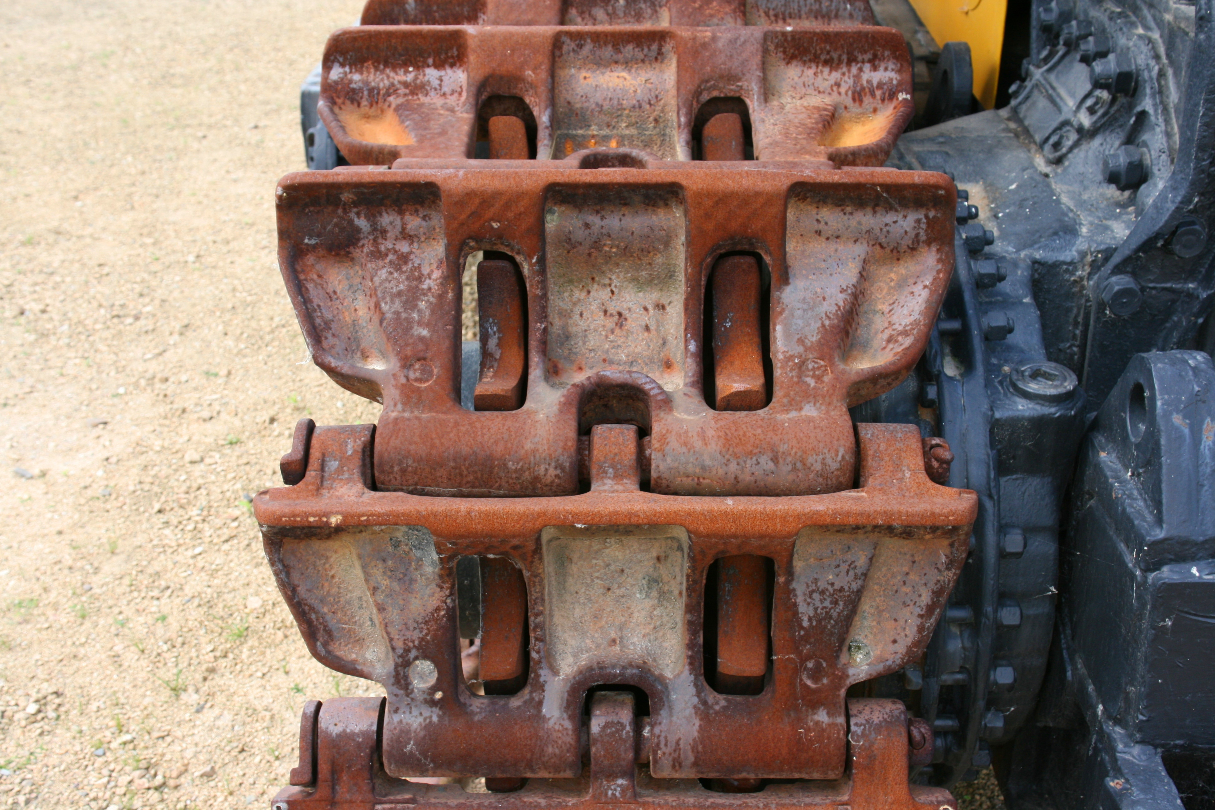 Raupe T 180 G im Museum “Bagger 1452”, Berzdorfer Straße 102 in Görlitz